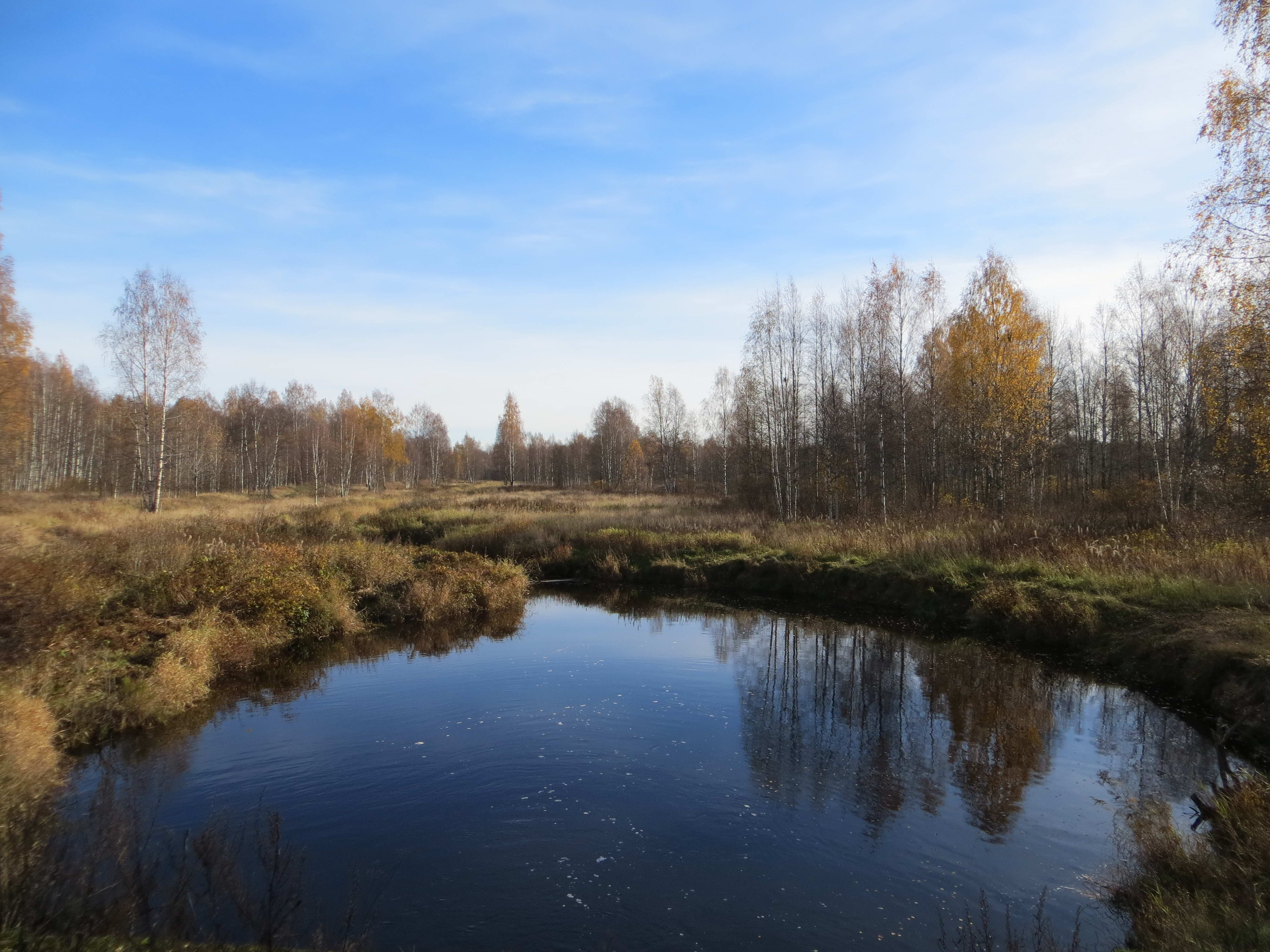 Река Лепсари на Ржевском артиллерийском полигоне. Вид на юго-восток.